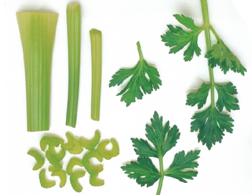 Daun Sadri atau seleri